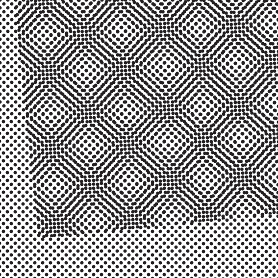 Moire (type quadrat)